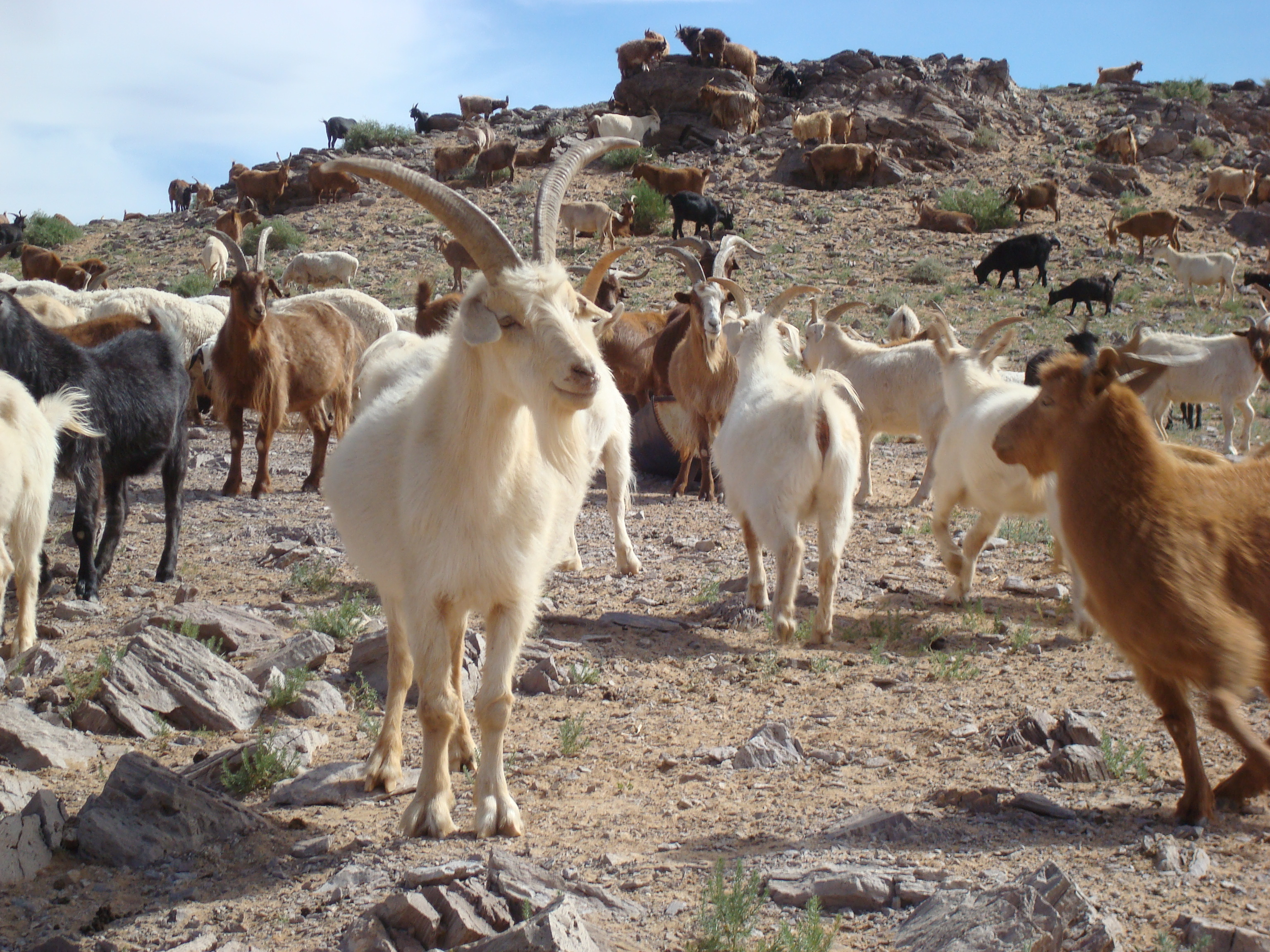 Im Ömnögovi Aimag